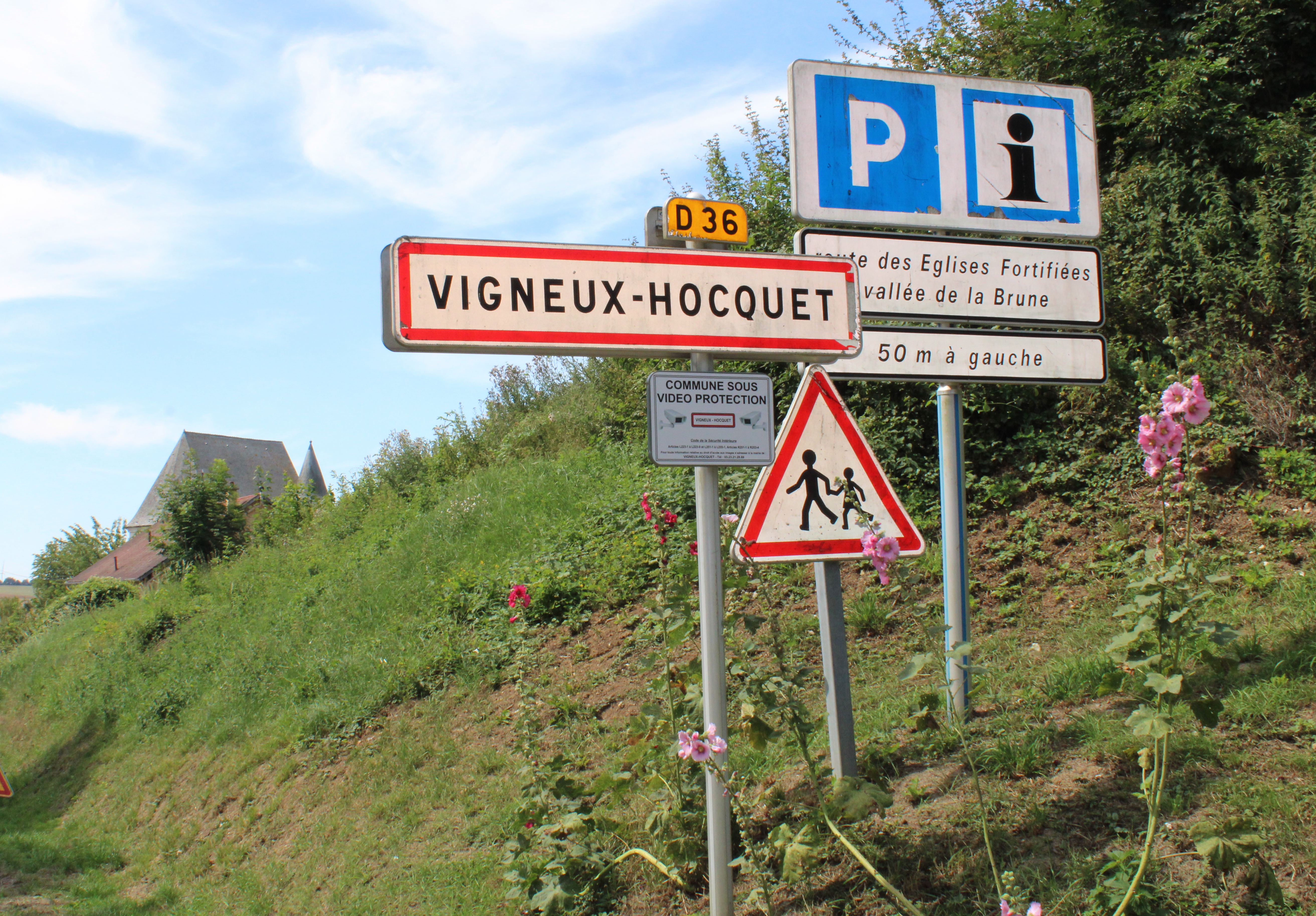 Entrée du village